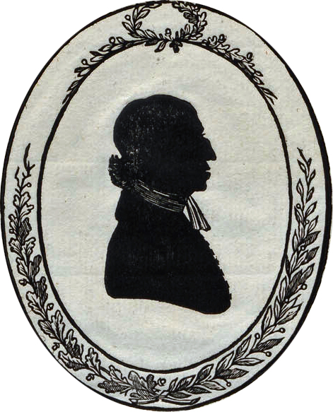 Nicolaas Lobry (1766_1818)